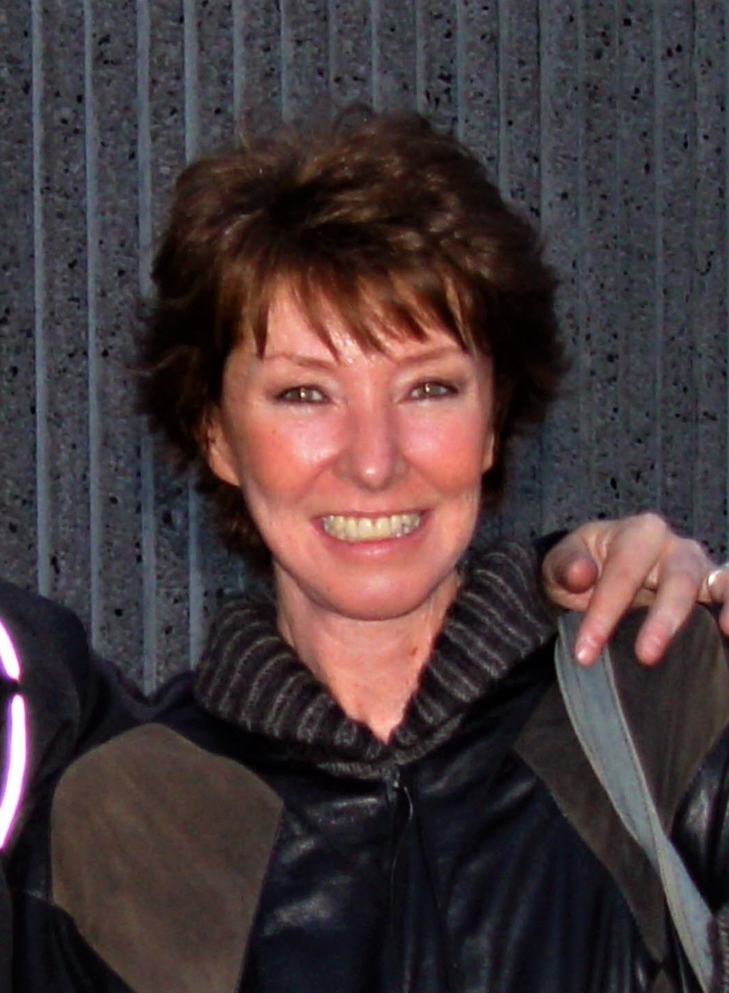 Axelle Abbadie au théâtre pour "l'huitre" en 2007